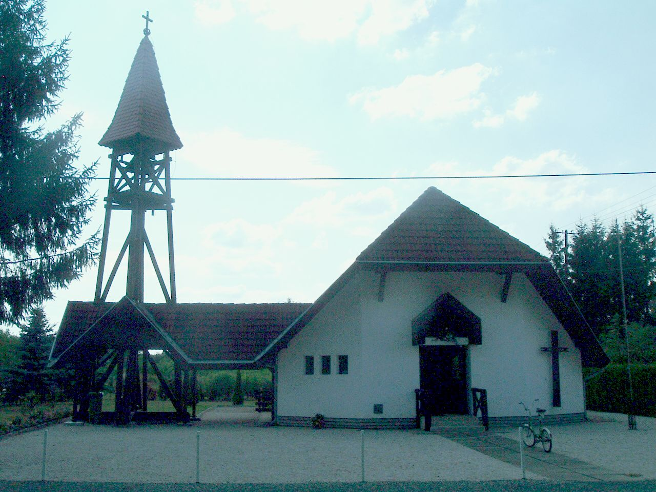 The Roman Catholic Church in Rátót. Szent Erzsébet római katolikus templom